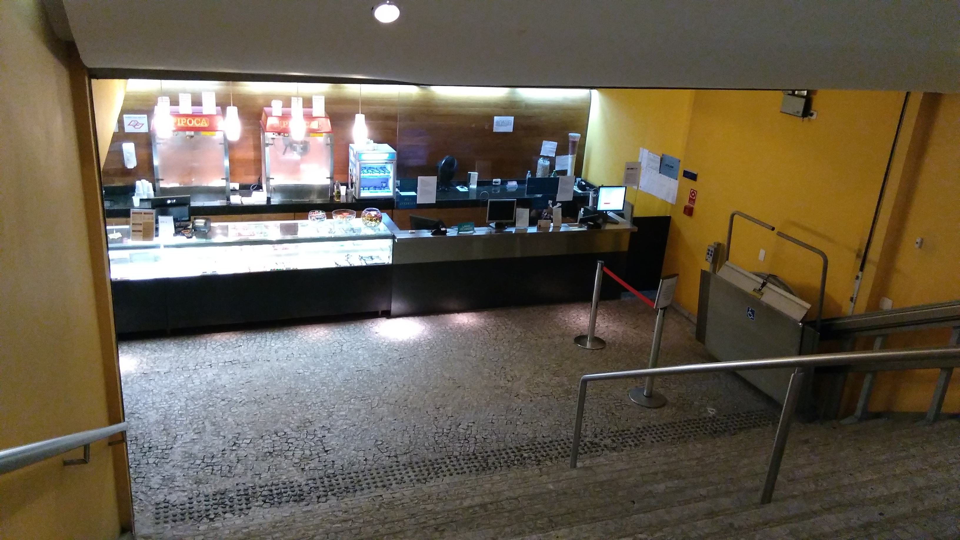 Bomboniére do Cinearte no Conjunto Nacional em São Paulo, SP